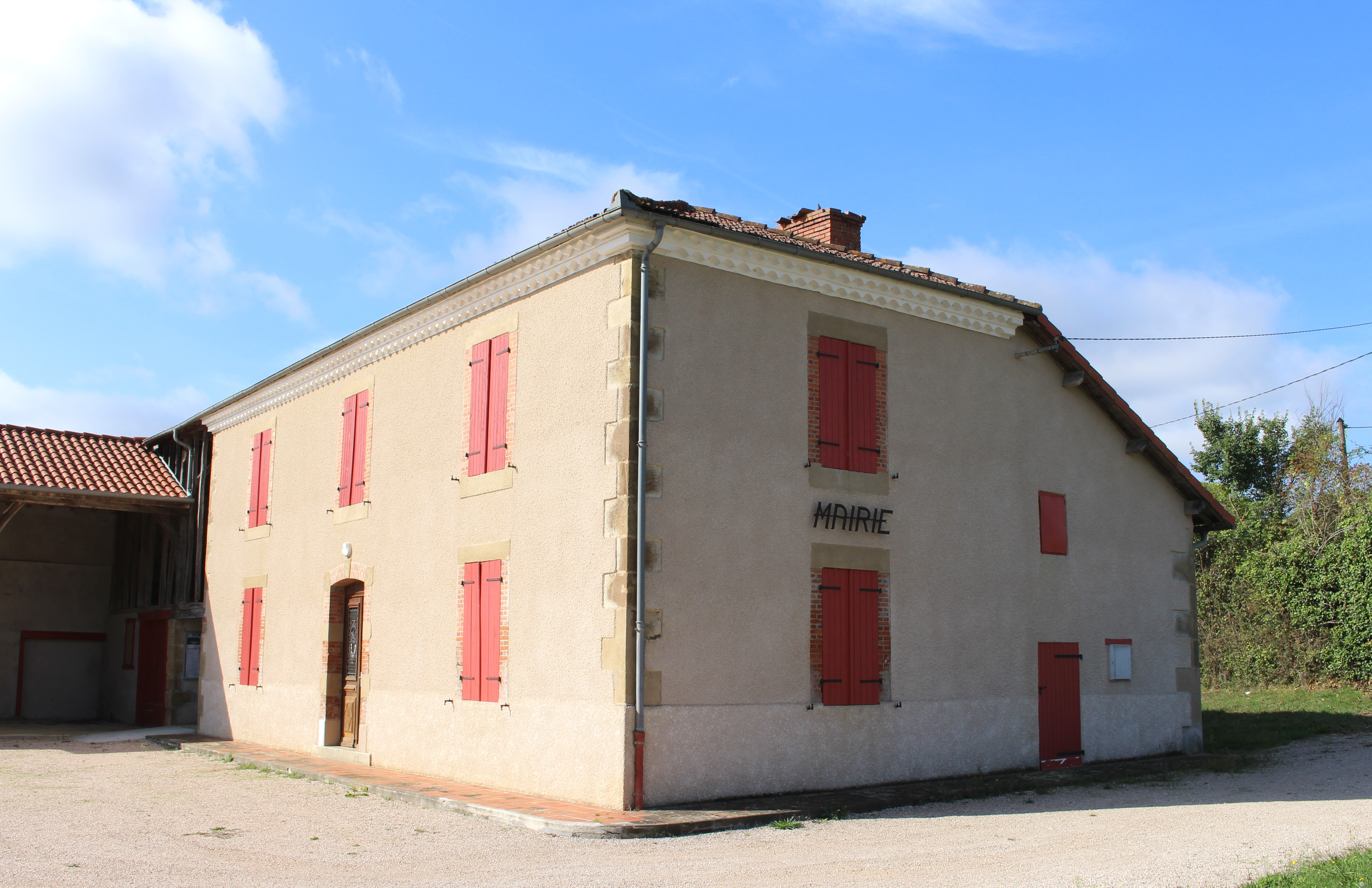 Mairie de Casterets (Hautes-Pyrénées)